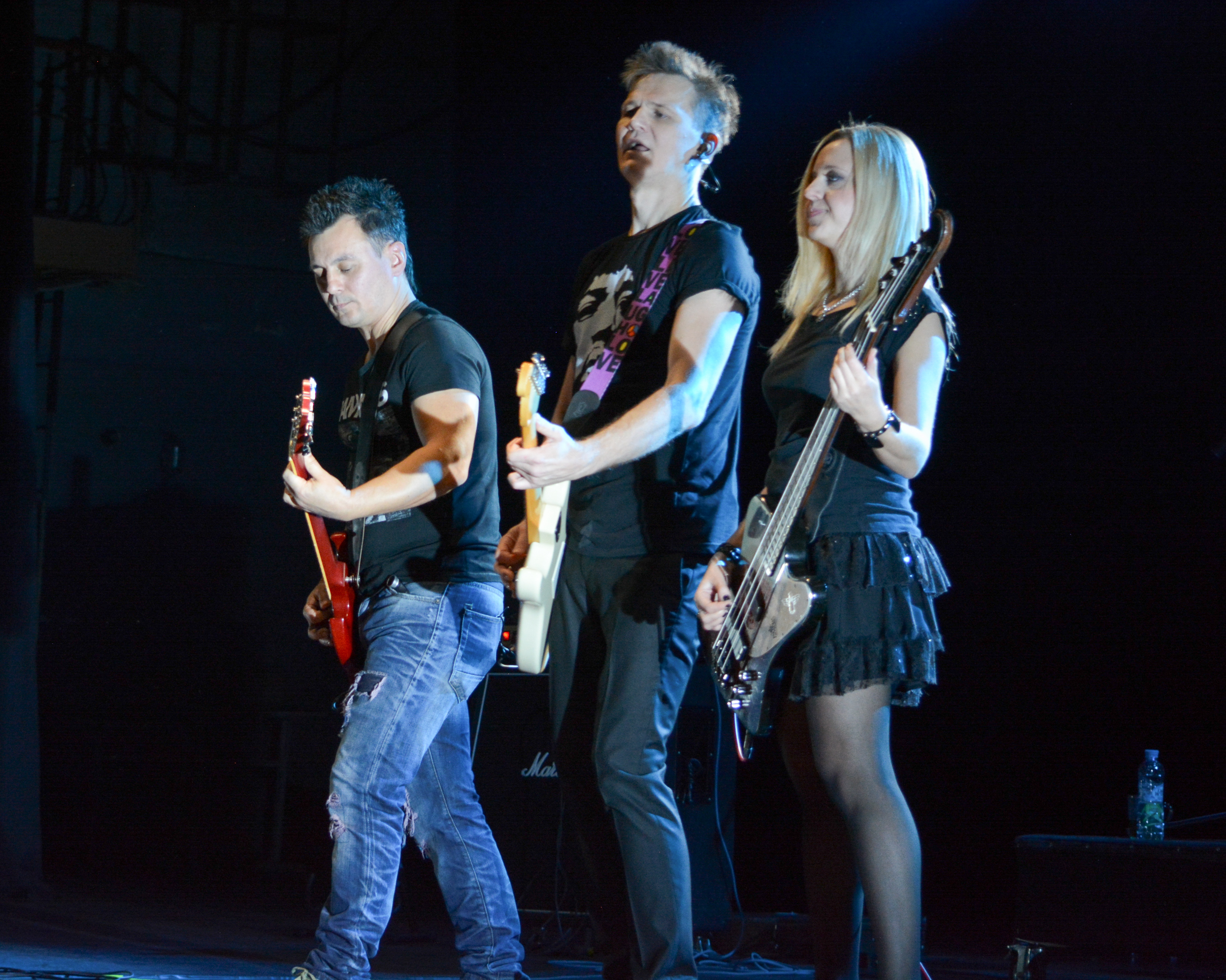 Группа «Приключения Электроников». Концерт в «GLAVCLUB» 22 октября 2014 года